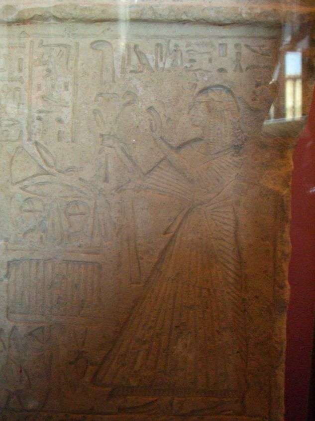 Détail de la stèle de l'Apis enterré par Mérenptah sous le règne de son père Ramsès II - XIXe dynastie égyptienne - Musée du Louvre